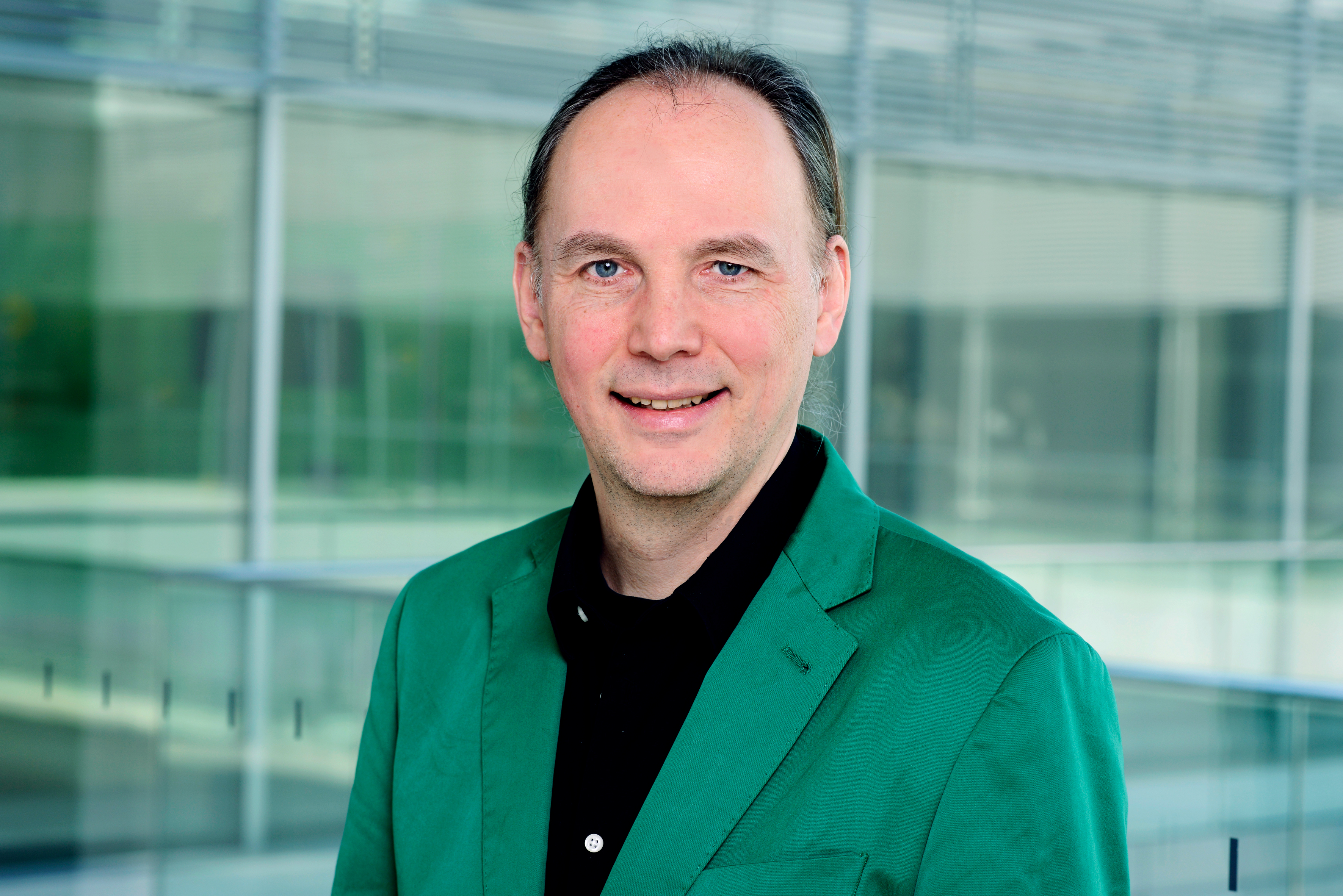 Wolfgang Strengmann-Kuhn-MdB, Bündnis 90/Die Grünen Bundestagsfraktion